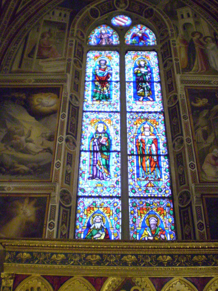 Вираж в капелле Барончелли в церкви Санта-Кроче, Флоренция